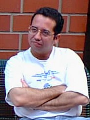 Walter Arencibia, Recklinghäuser Schachtage 1998.